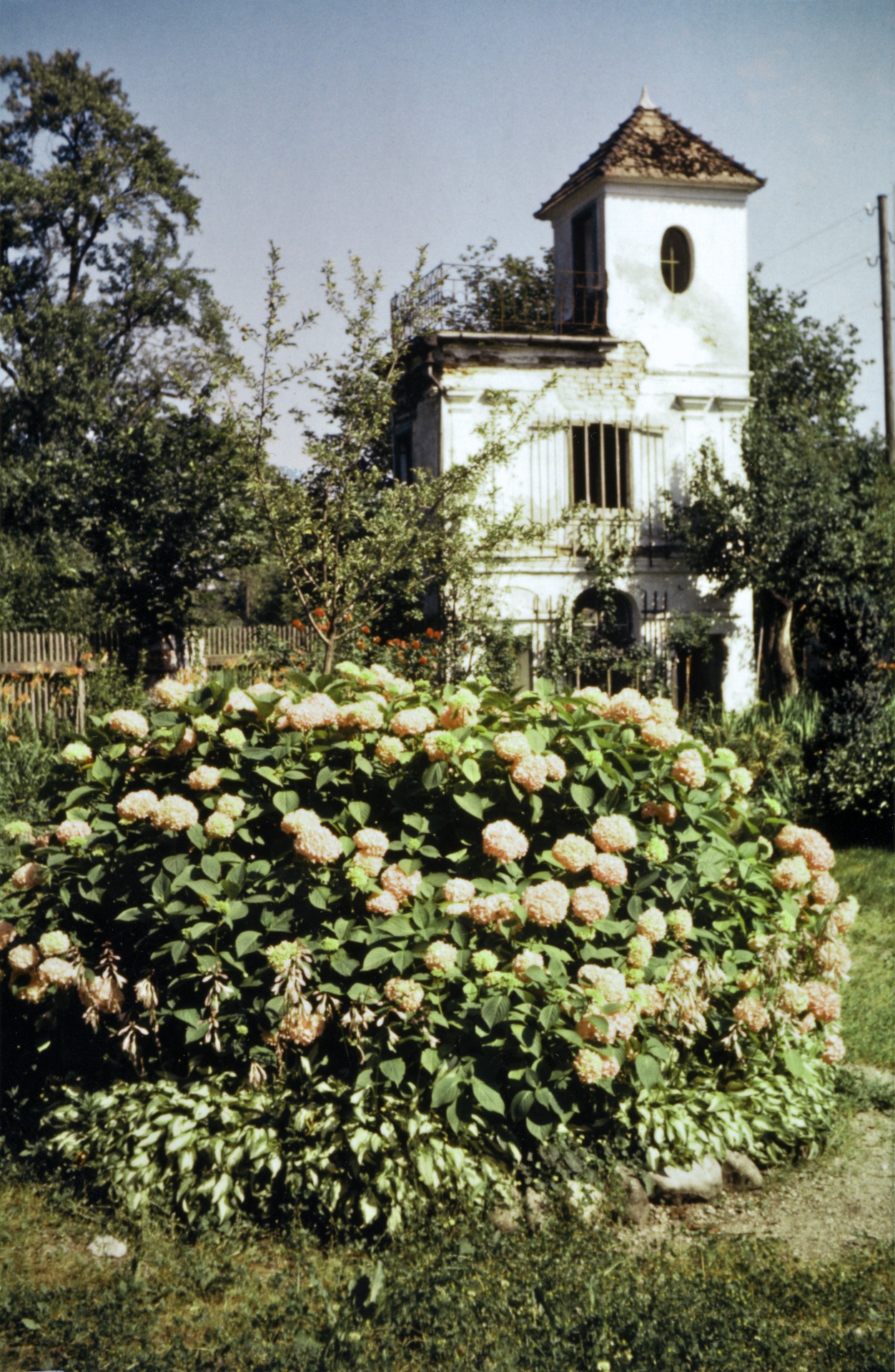 Heute nicht mehr existierendes Gartenhaus im Herrschaftsgarten der ehemaligen Sensenschmiede am Gries (Gradn) auf einer Fotografie um 1970.